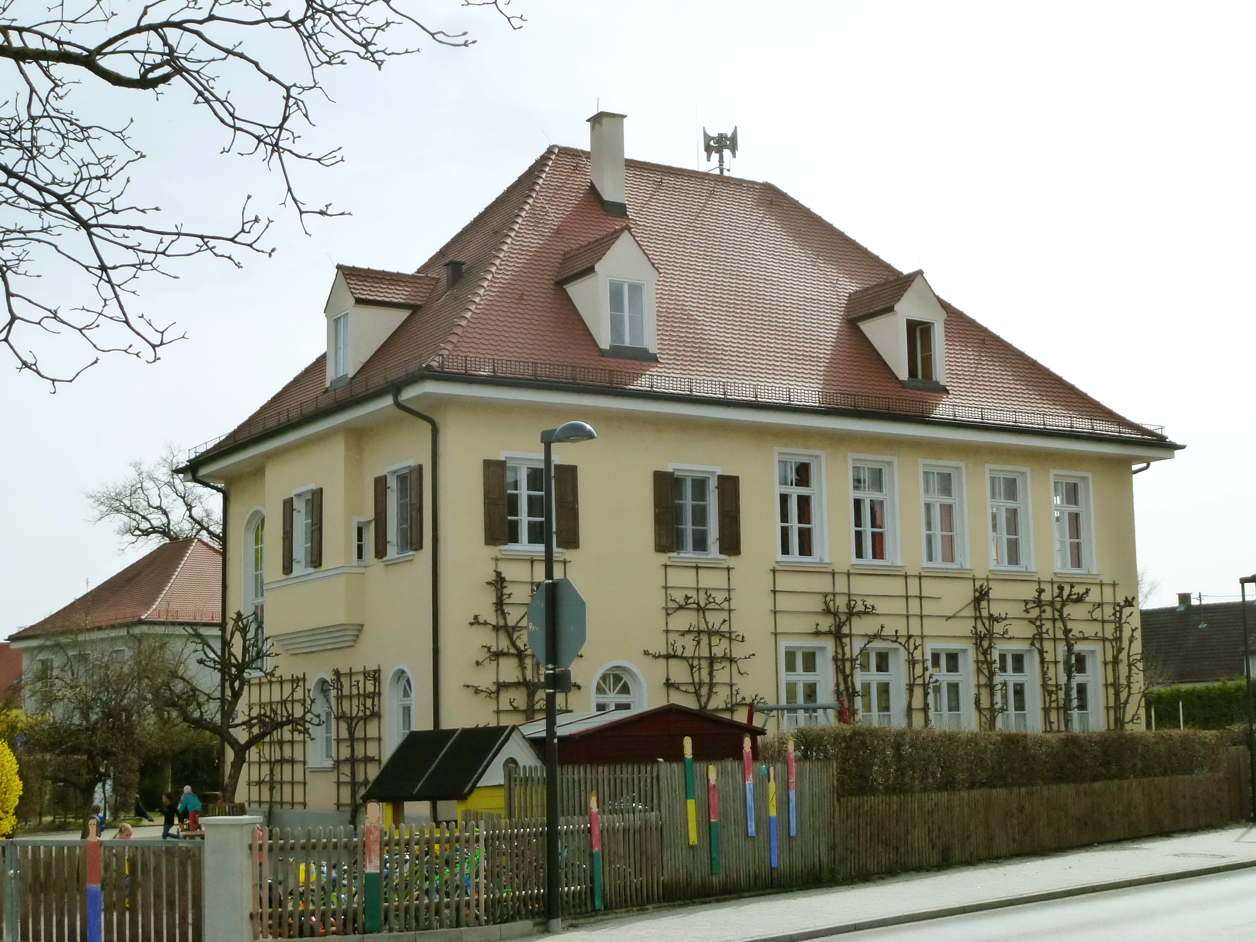 Emmering, Amperstr. 1: Ehemaliges Schulhaus, heute Kindergarten. Aufnahme von Norden.